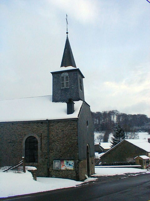 Walon: Eglijhe di Bayamont (poirtrait saetchî pa L. Mahin)